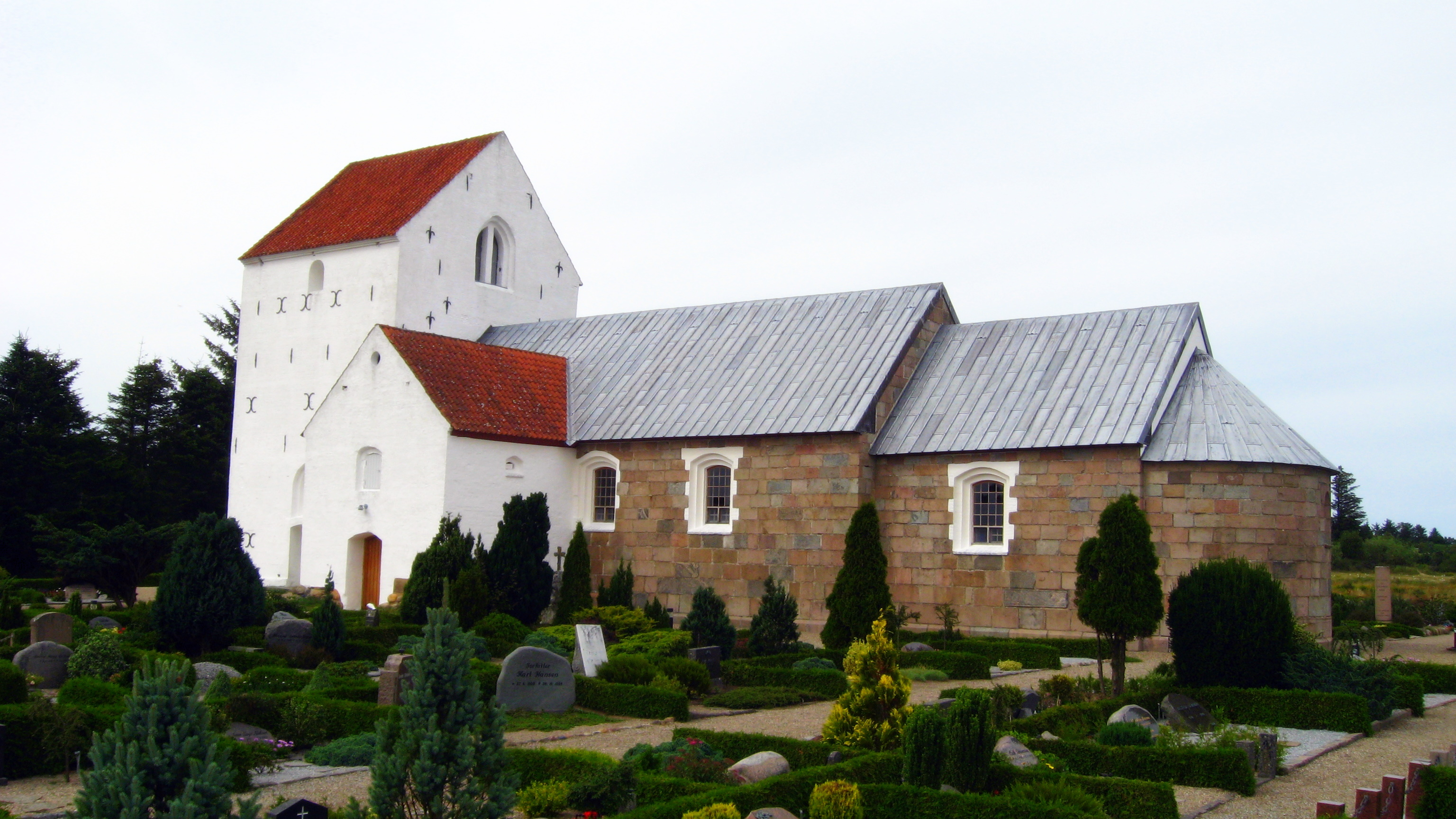 Hune Kirke, Hune Sogn, Jammerbugt Kommune